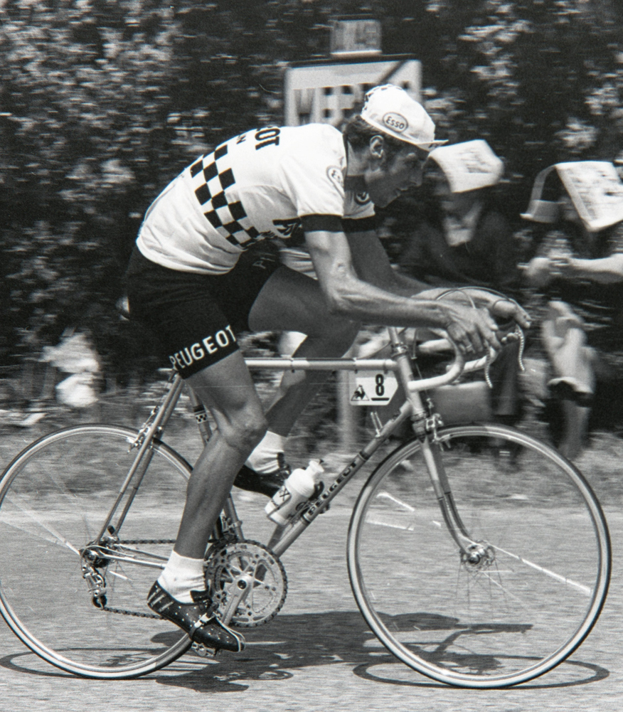 Régis Ovion durant le Tour de France 1976. Photographie : René Milanese